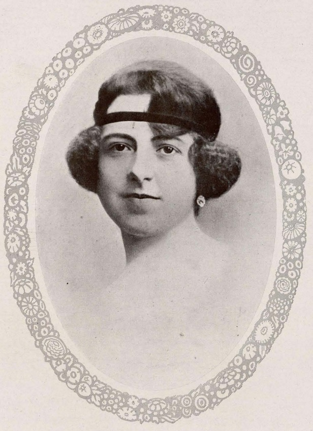 Marquesa de Espinardo. Fotografía de Kaulak